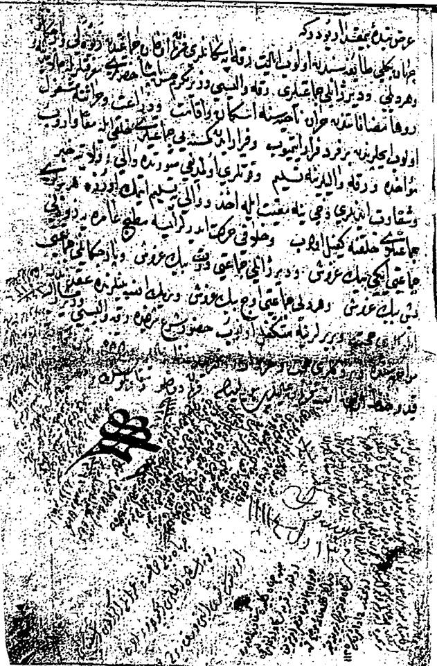 16. yy Boyun Rakkaya Sürkün Belgesi